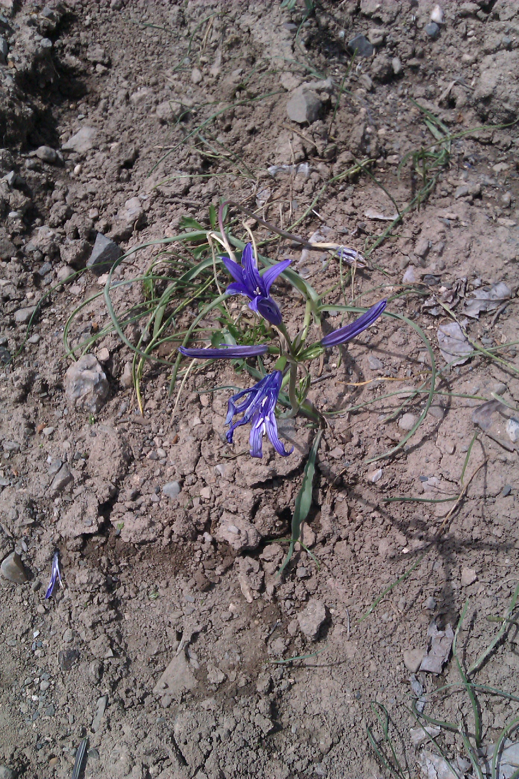 گونه های گیاهی روستای ییلاقی فرج آباد